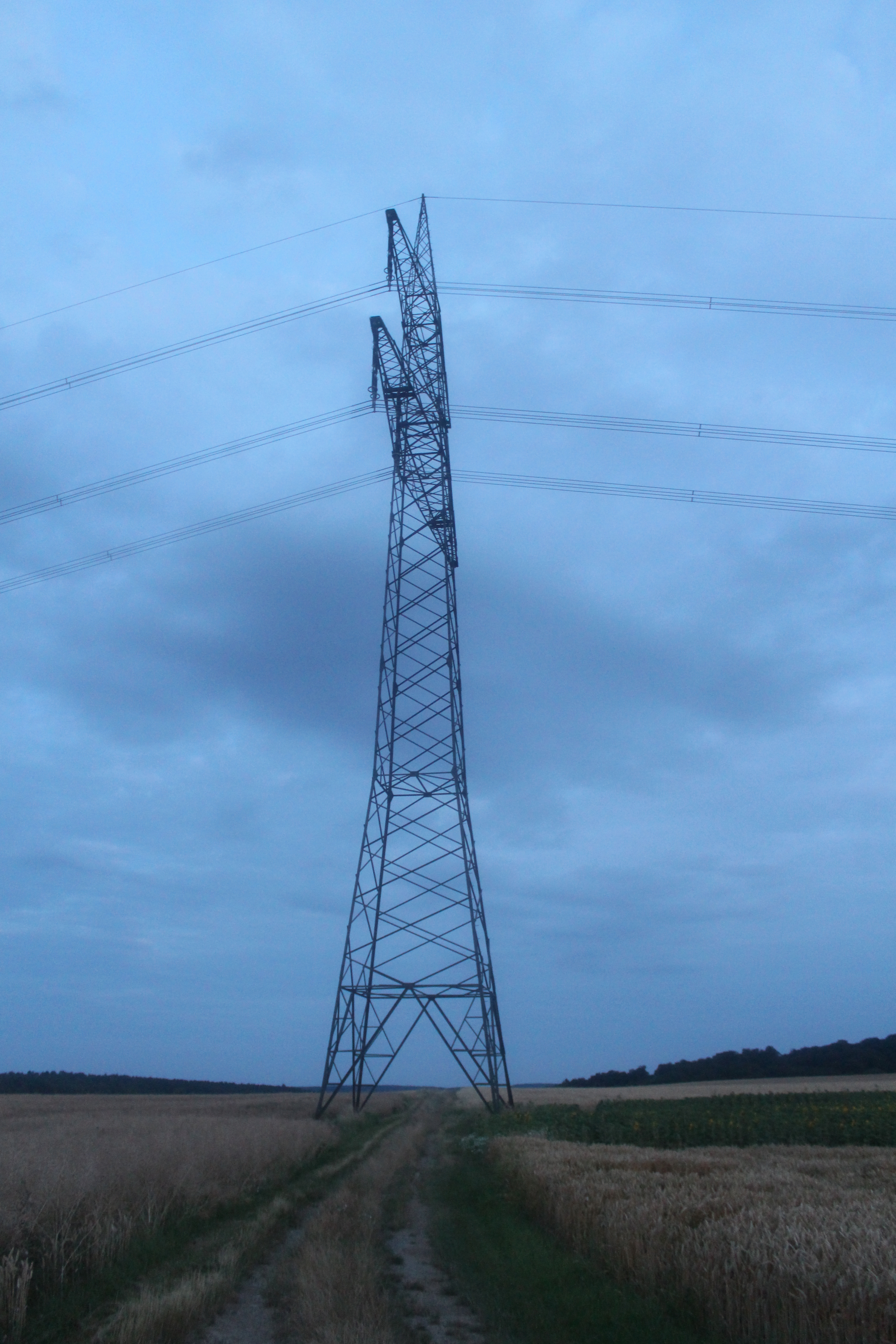 Anlage 7610, Mast 69 - ein Mast unter dessen Beinen ein Feldweg hindurch führt